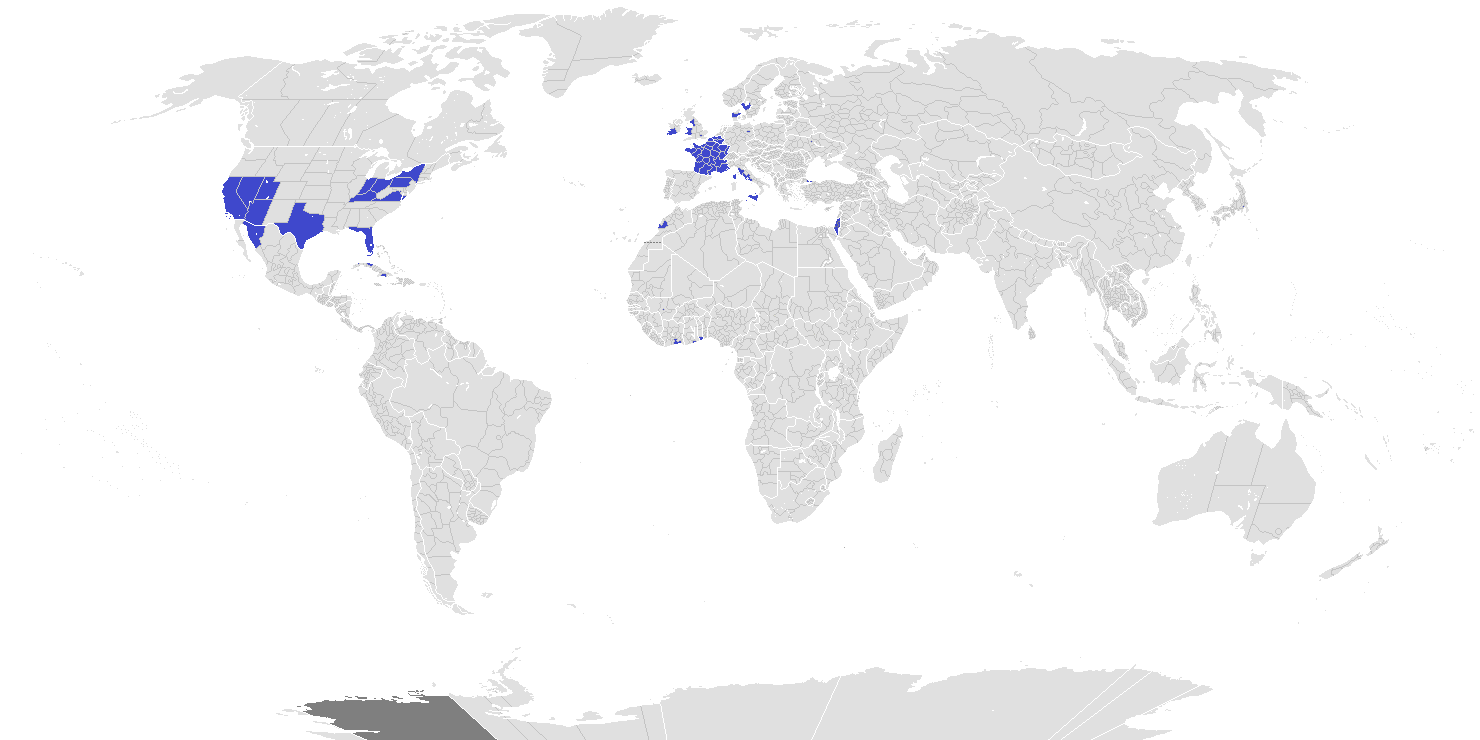 Cette carte montre les territoires régionaux visités au moins une fois par les journalistes de l'émission Quotidien de Yann Barthès, pendant la saison 1.